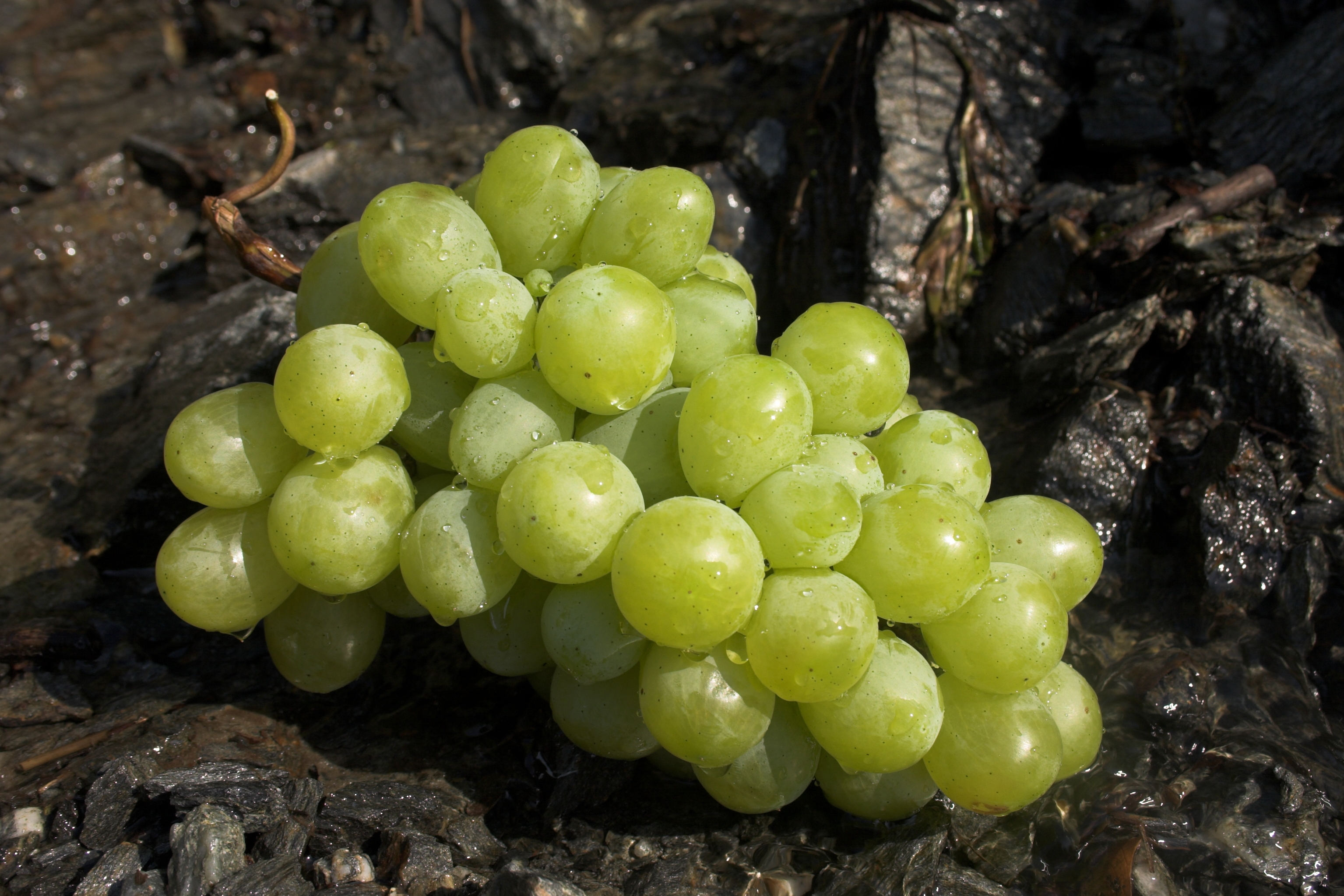 A green wine grape.